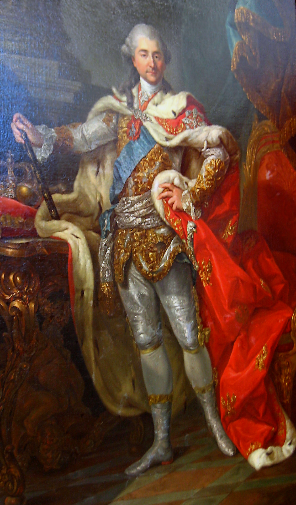 Stanisław August Poniatowski